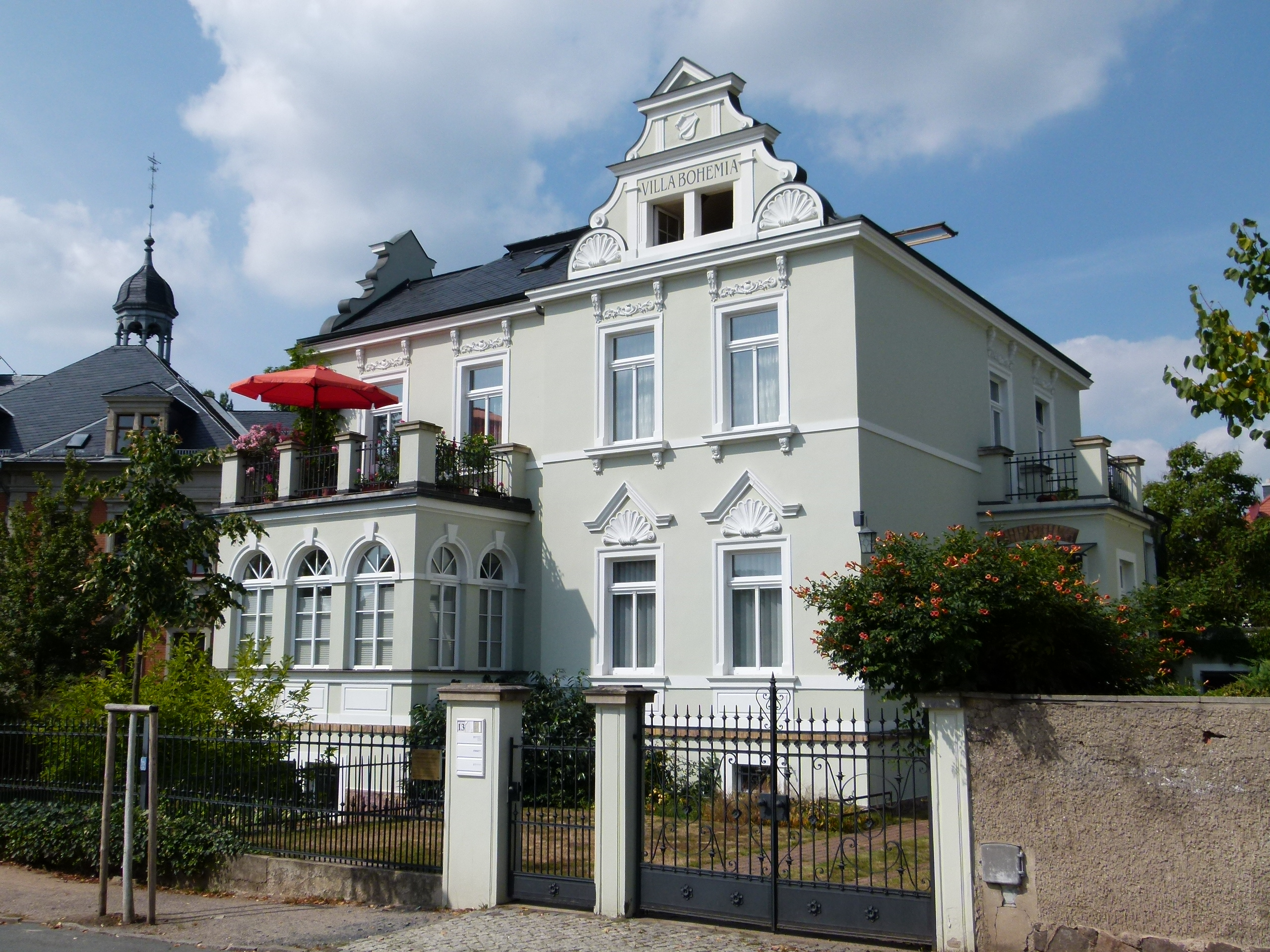 Denkmalgeschütztes Haus, Dr-Rudolf-Friedrichs-Straße 13, Radebeul, Sachsen